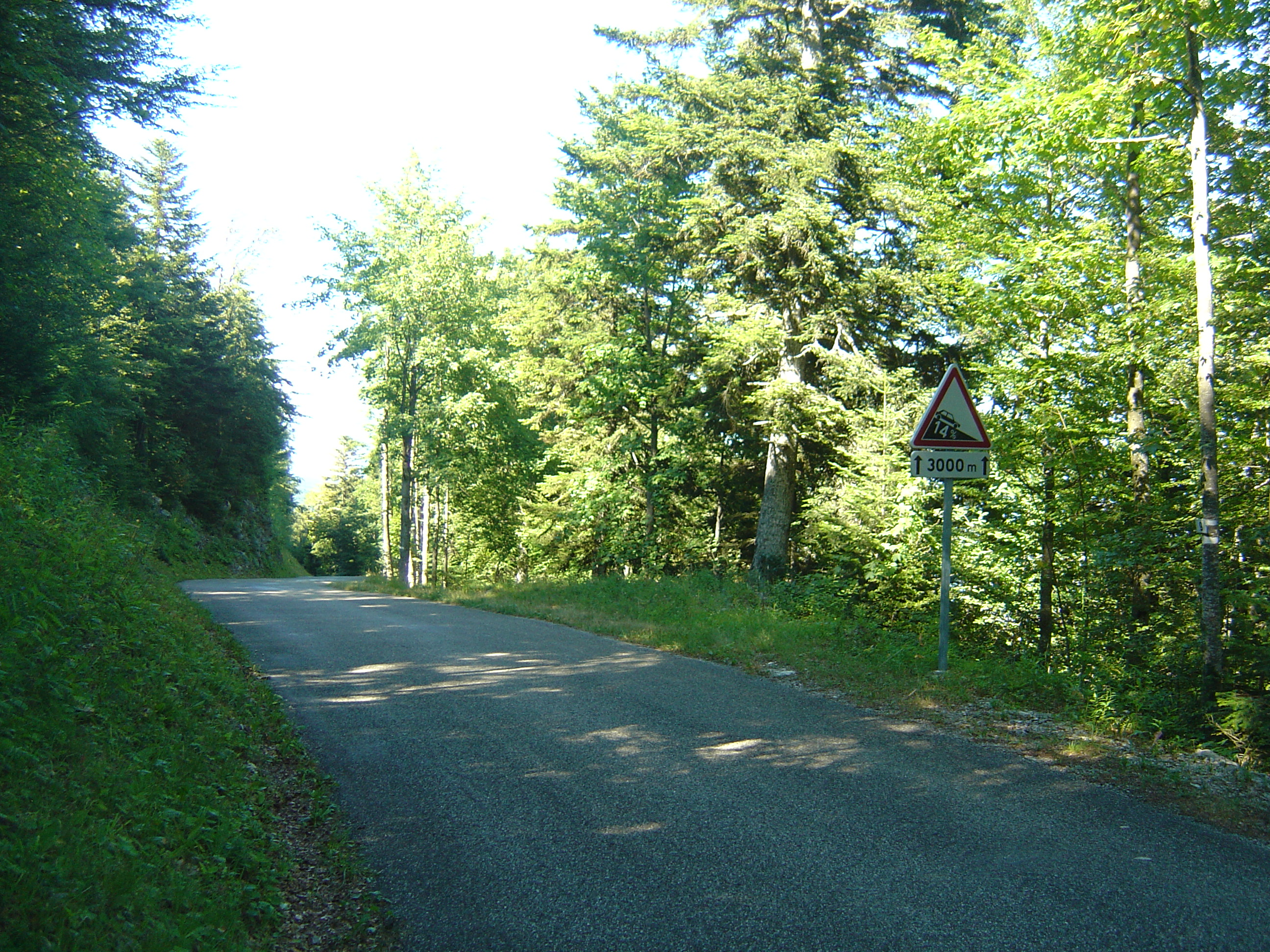 Trois kilomètres raides après la jonction des routes de Culoz et Anglefort. Le panneau annonce des passages à 14%